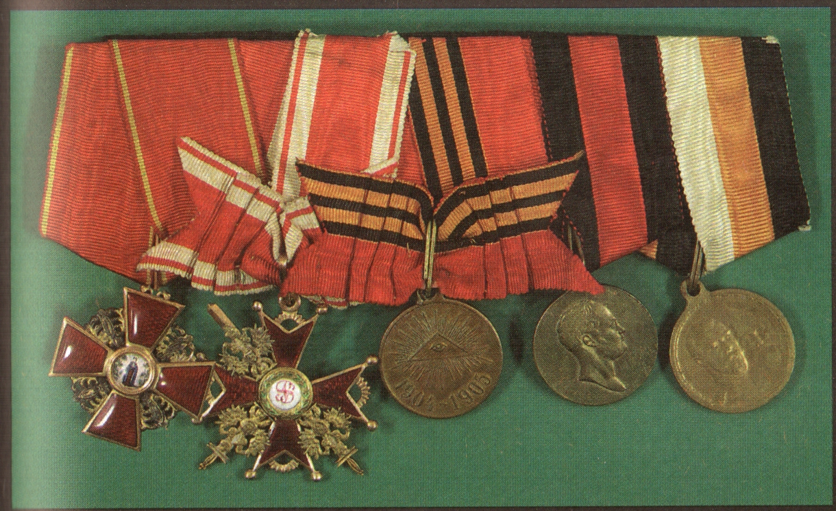 награды М. Г. Дроздовского